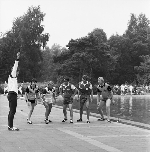 Foto's tijdens een opname van AVRO's Sterrenslag